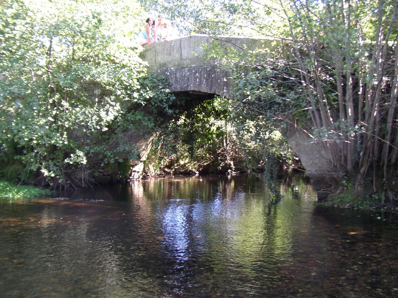 Puente medieval sobre el río Iso.